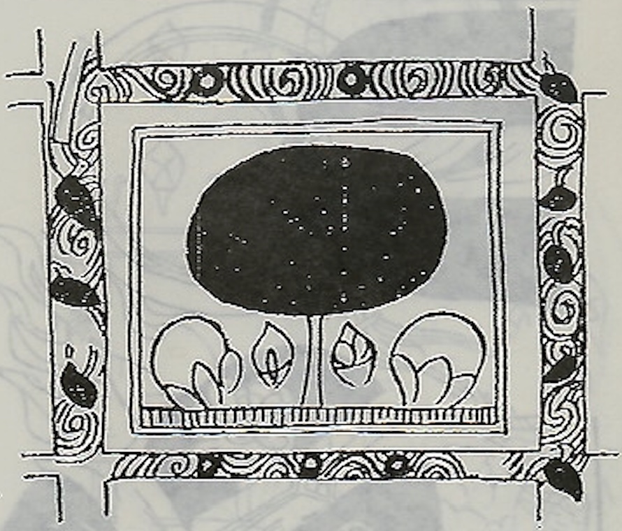 七重寶樹神使圖細部，吐峪溝西南區第2窟。主室正壁畫有七重寶樹神使圖，橫列每列7棵寶樹，上下共7列，共49棵樹，該圖為49棵樹其中1棵。 在摩尼教文獻中，與「7」有關的數有多種，如摩尼教有7部大經；每週7天，每天7次懺悔禮拜；每年有7次祭祀；向教團有7種施捨；當摩尼教神先意與暗魔相鬥時，曾7次向大明父祈求；生命樹可分為根、基、枝、葉、果、氣、色7部分；摩尼信徒每月初一、十五供奉七七四十九個銅板香火錢等等。考慮到這大幅寶樹果園圖是畫在洞窟裡最主要的供奉禮拜壁面，而在同類洞窟中都畫這同一題材，那麼這幅畫是洞窟裡最主要的壁畫，其題材應是十分重要的，那麼這7棵樹代表的就是摩尼教的7部大經。再由於光明王國裡寶樹總是成行成列，因而寶樹便被排列成7列7行。 這些寶樹除了代表7部大經外，正如前此所論證的，它還代表摩尼、耶穌、生命樹、光明王國。關於這7部經，它也是擺渡信徒到彼岸世界的航船，那麼禮拜觀想這些寶樹，也就具有超渡和解脫的意義。